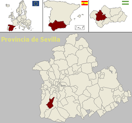 Mapa de situación del municipio sevillano de Isla Mayor (Andalucía, España)